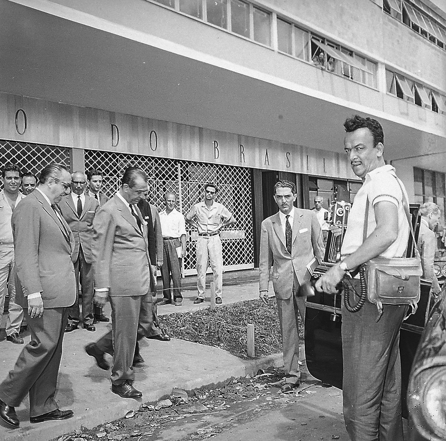 Imagem do Fundo Agência Nacional, do Arquivo Nacional